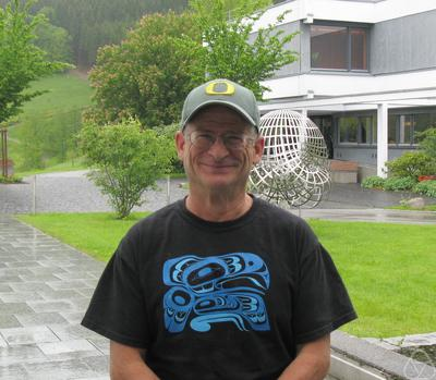 Foto di James A. Isenberg